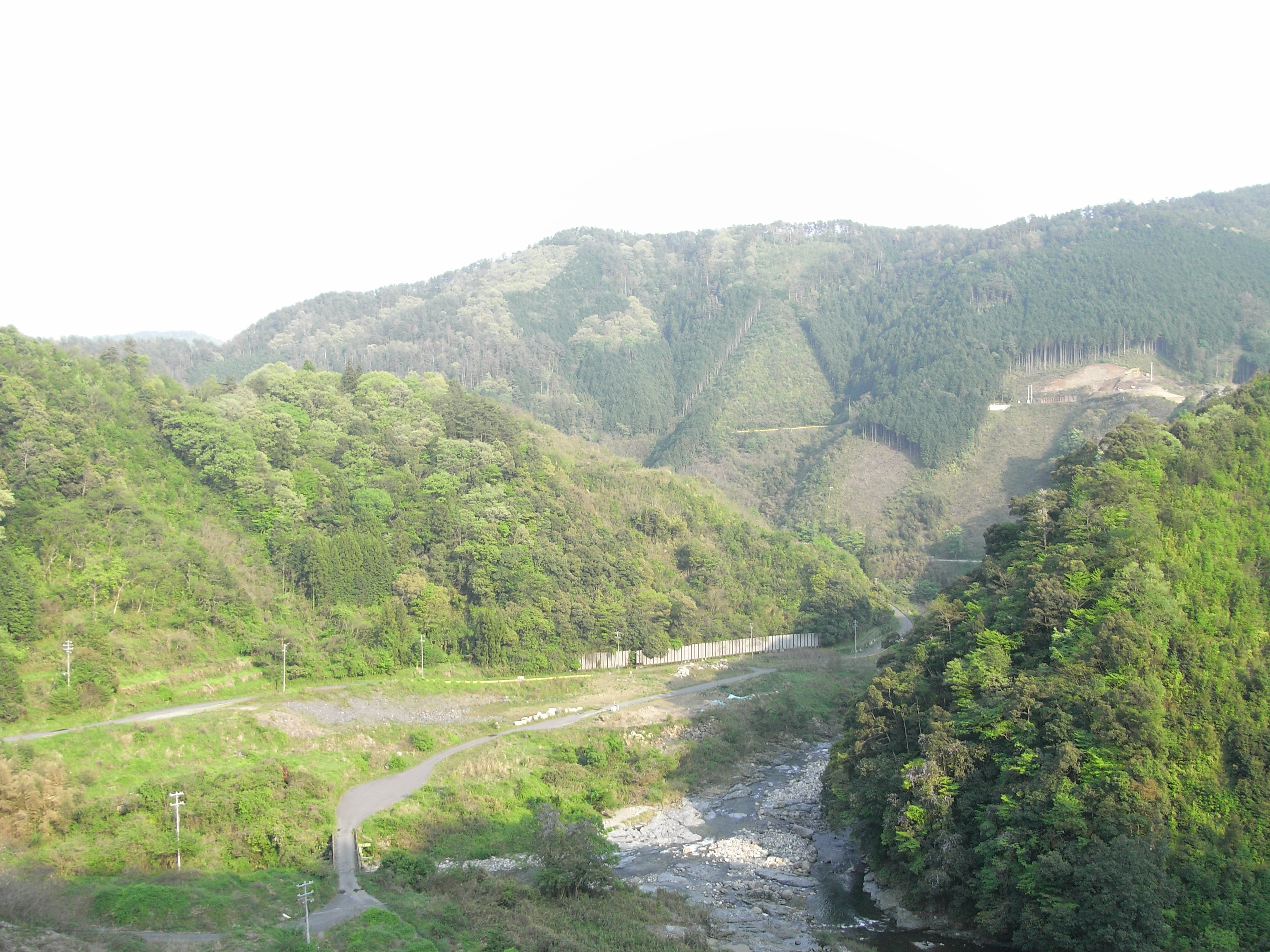 Dam